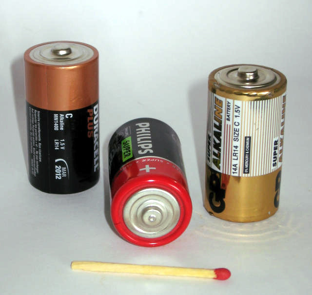 size R-14 (C) alkaline disposable battery